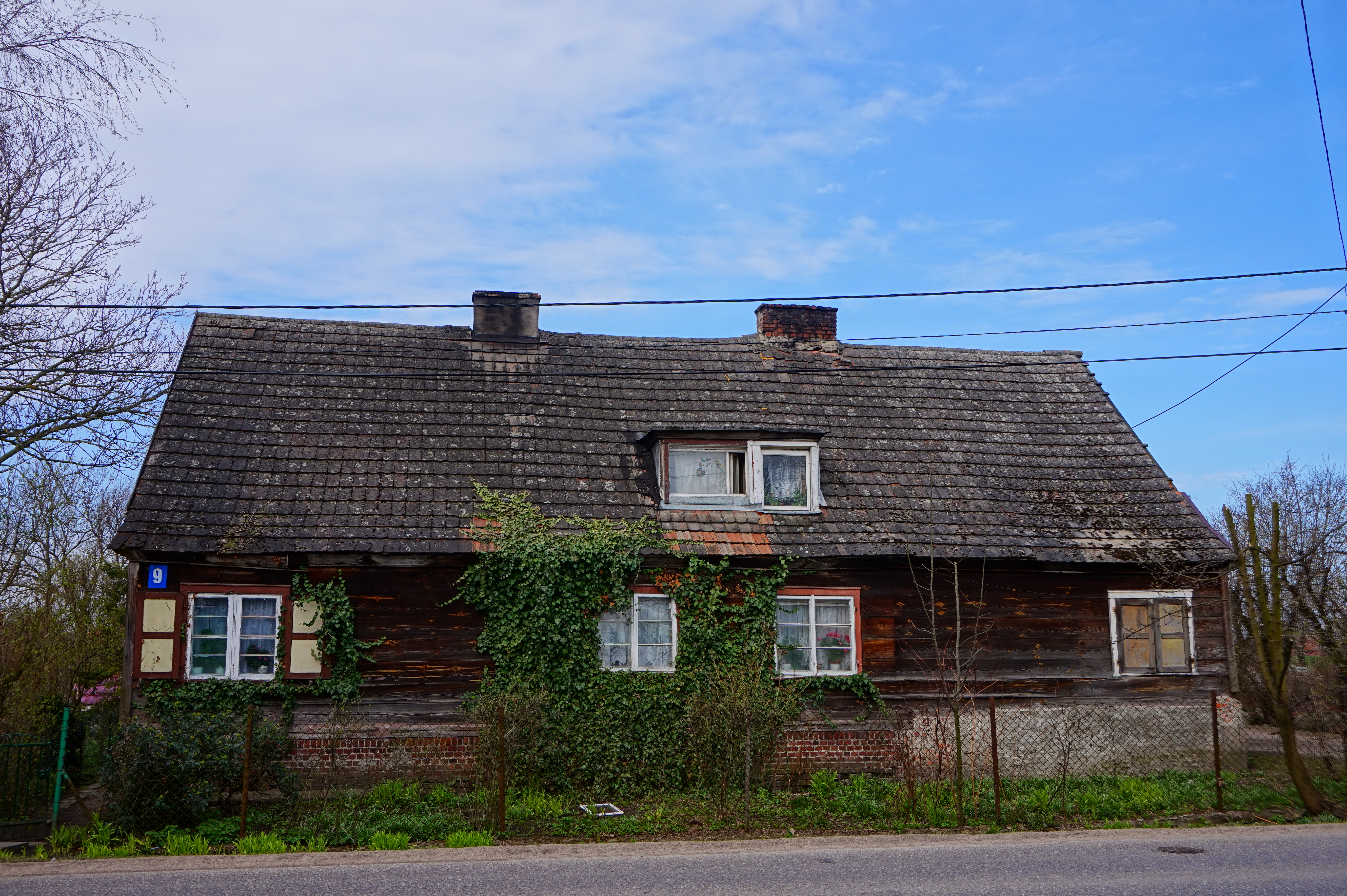 Zabytkowy budynek we wsi Mokry Dwór, pow. gdański